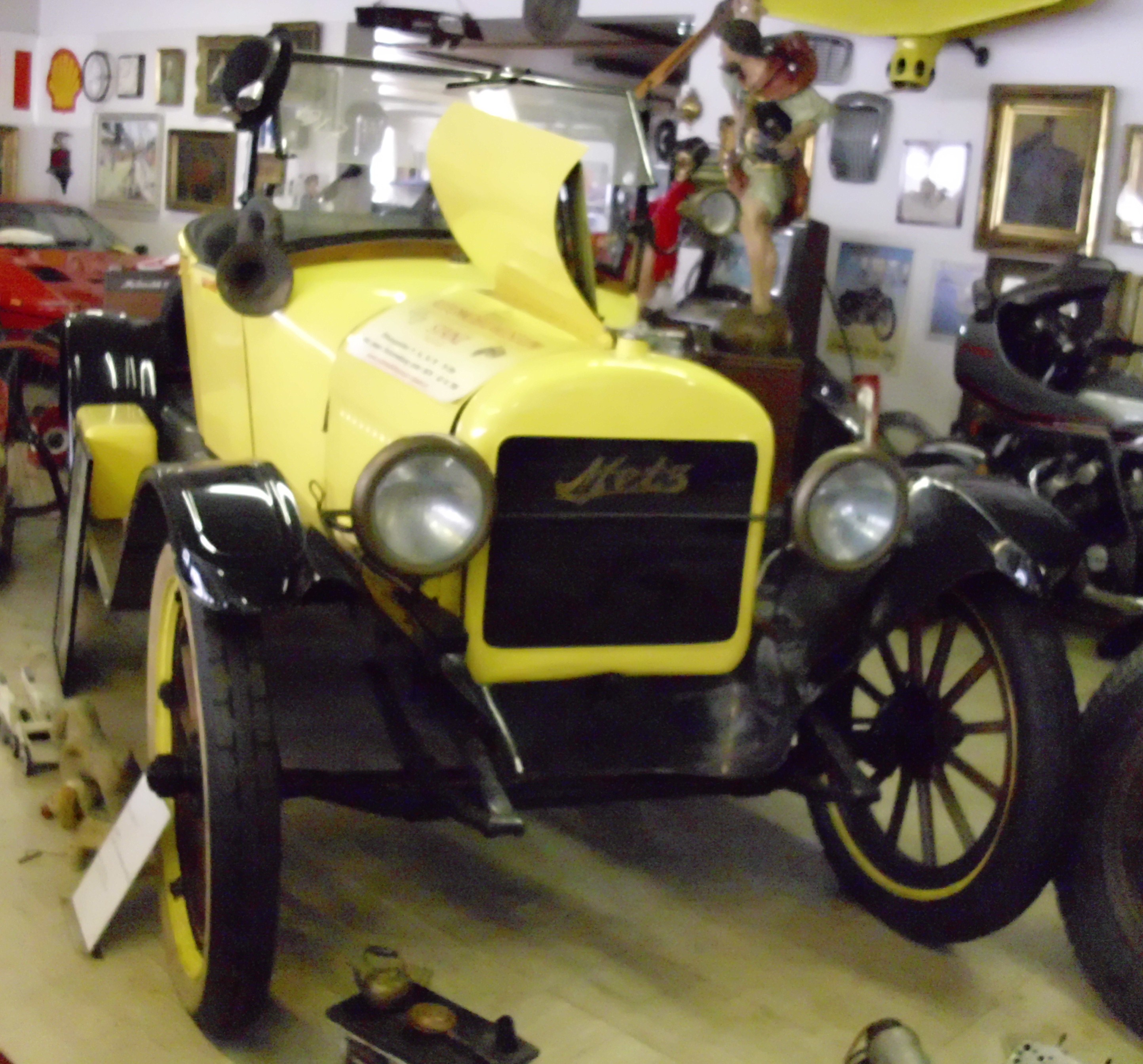 Metz 25 HP 1917 im Automobilmuseum Stainz